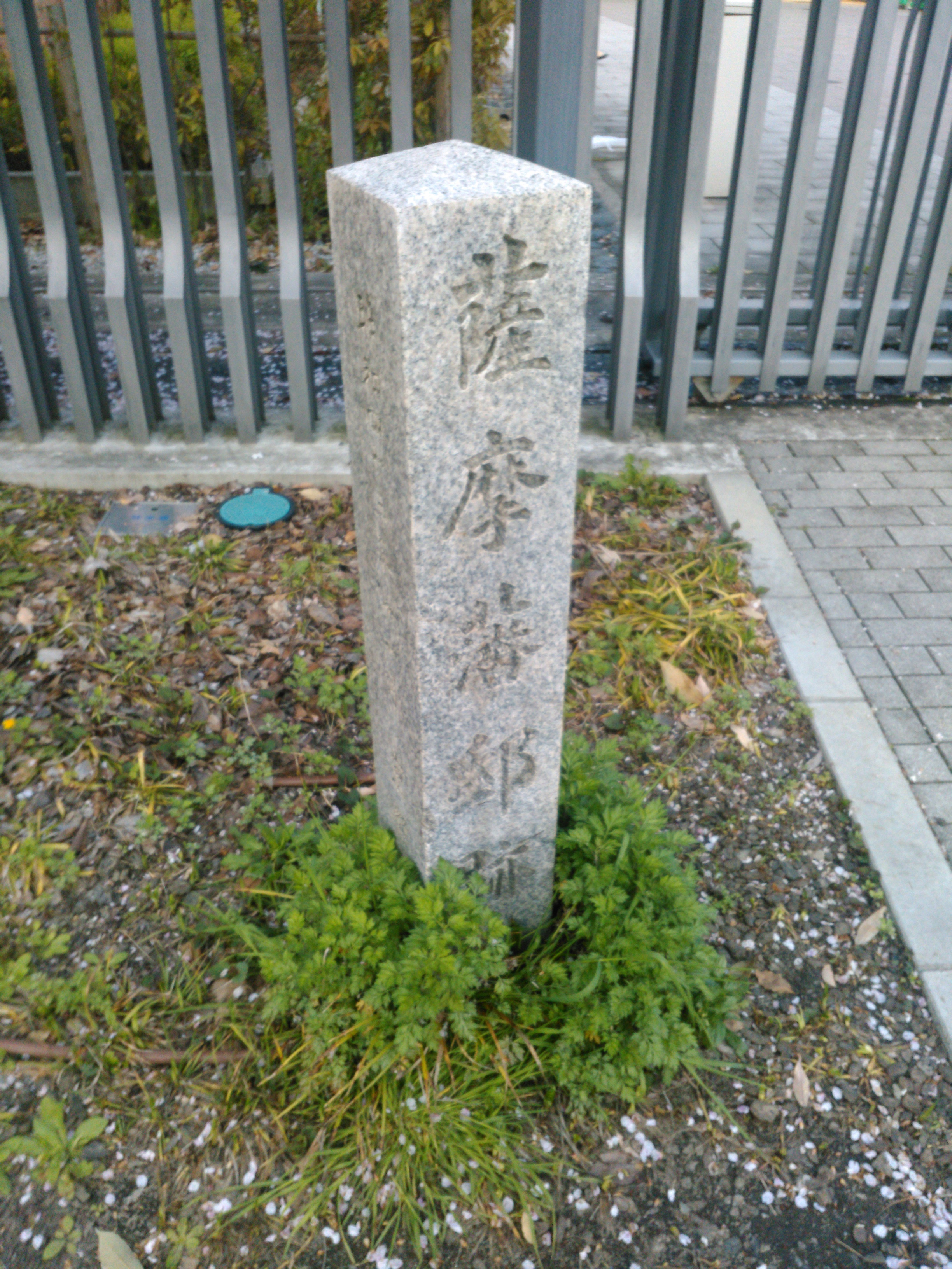 薩摩藩邸跡石碑（同志社大学今出川キャンパス前）